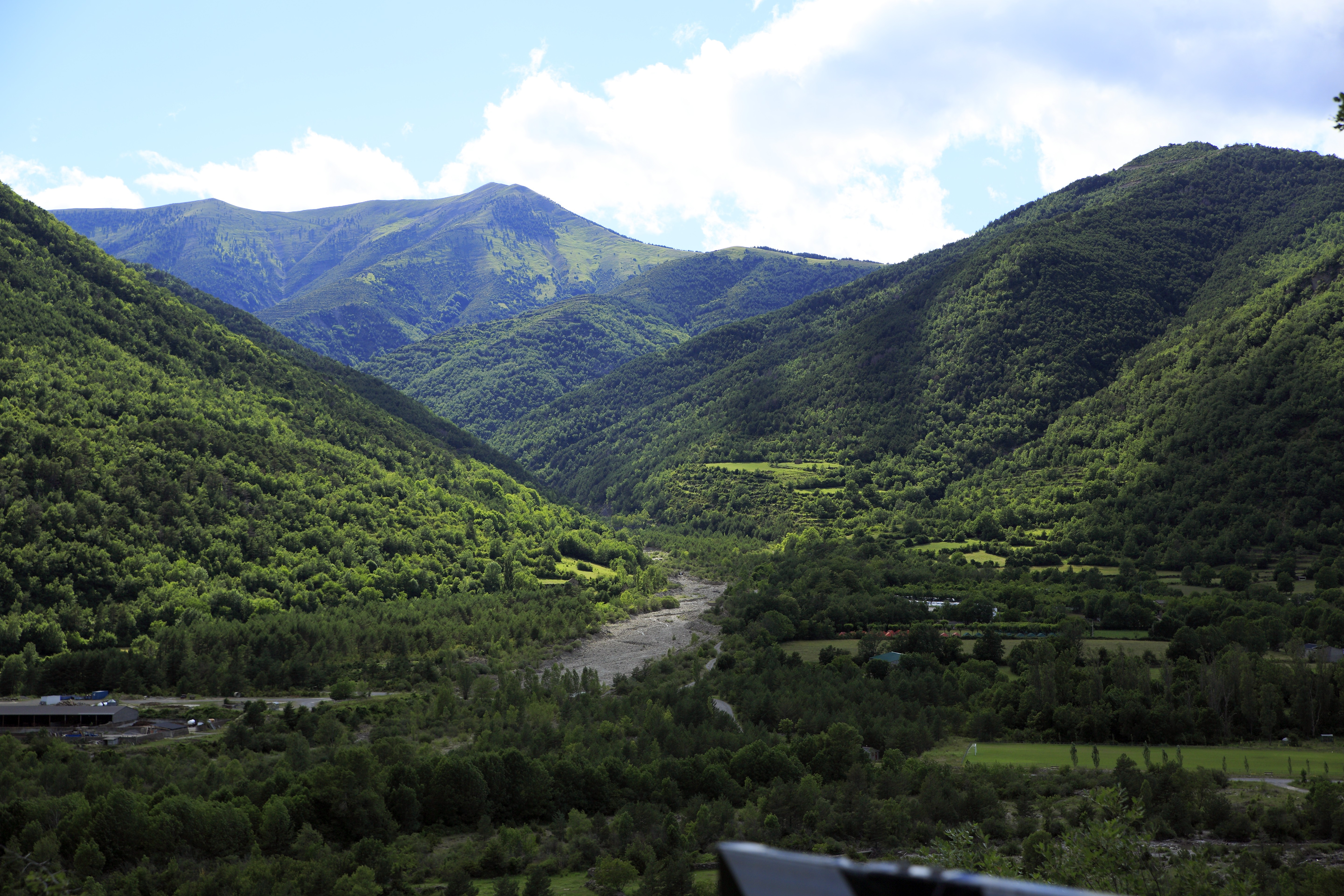 kommtnoch